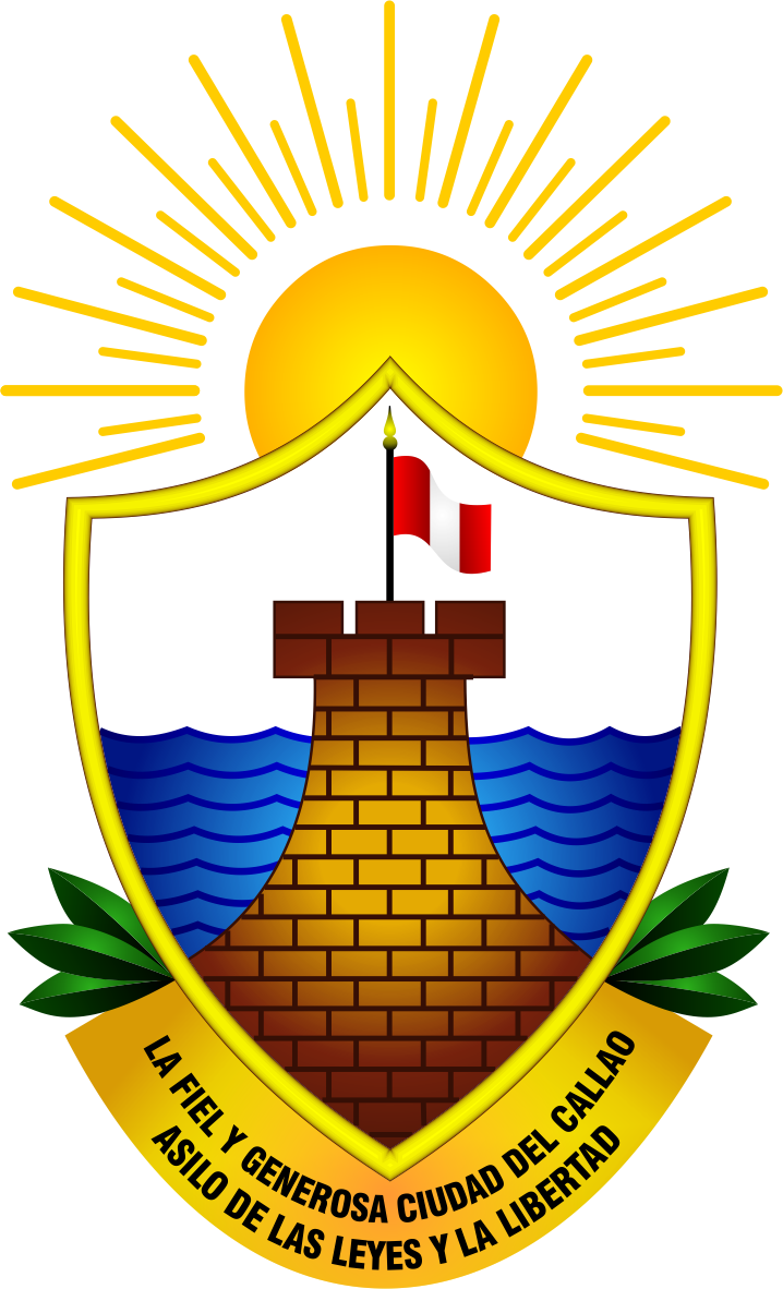 Distrito del callao - Provincia del Callao